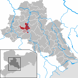 Mittweida in Saxony - district Mittelsachsen